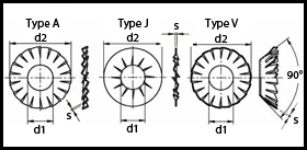 DIN 6798